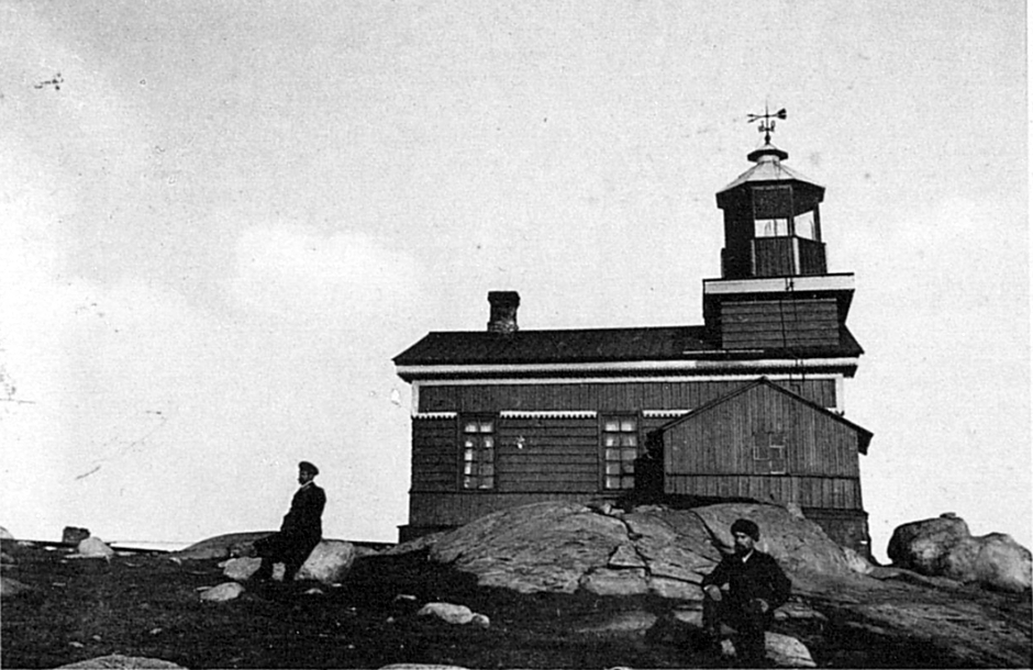 №39. Харловский маяк на Мурманском берегу Ледовитого океана.